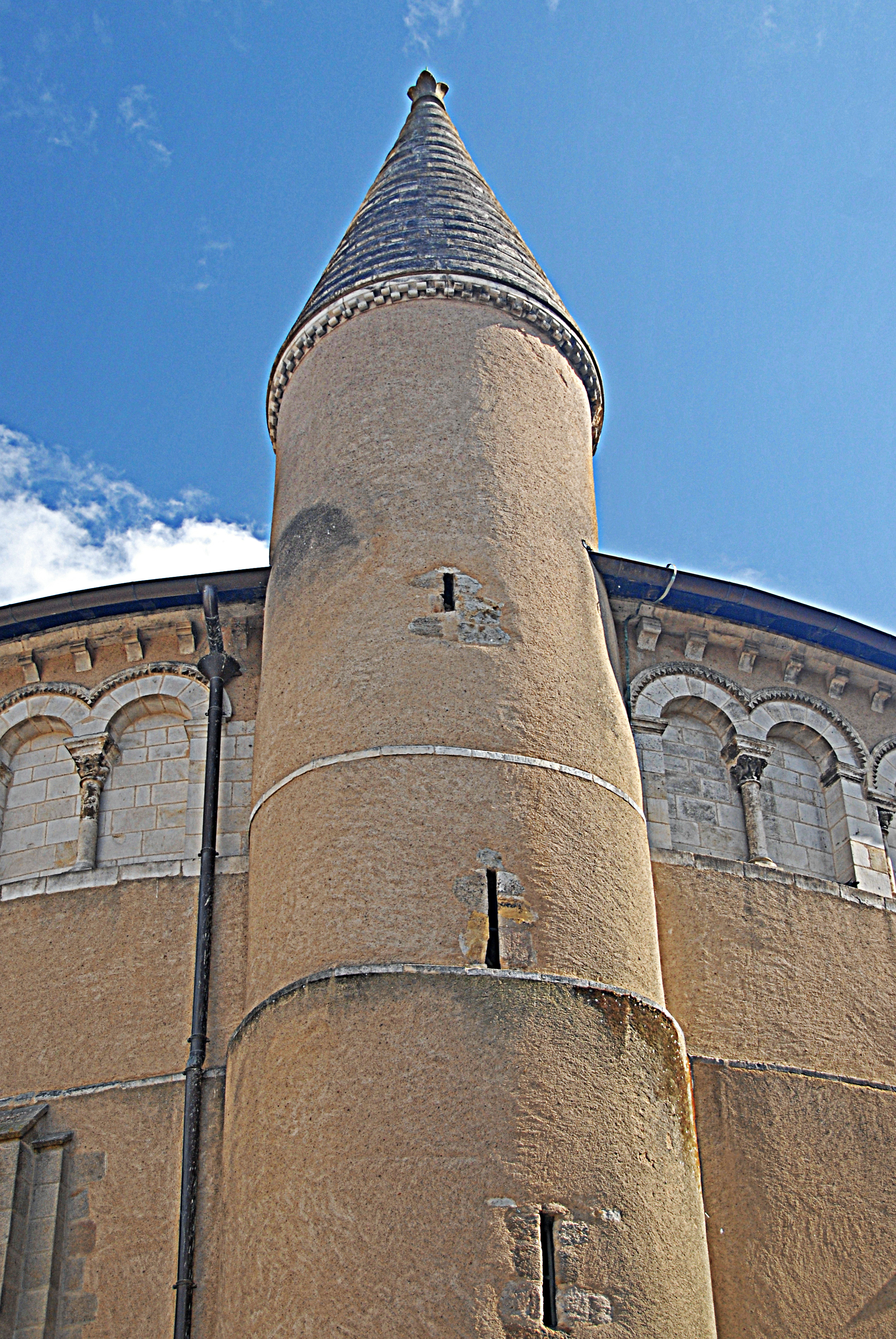 Neuvy_St.-Sépulcre, Rotunde, Treppenturm